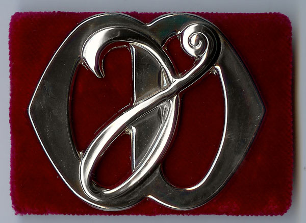 Baretembleem van de Militair-Psychologische en Sociologische Dienst